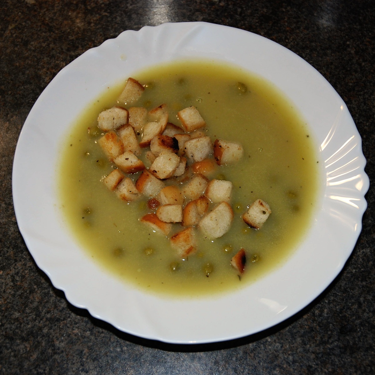 Hrachová polévka Vitana. Instantní polévka. Czech Republic.